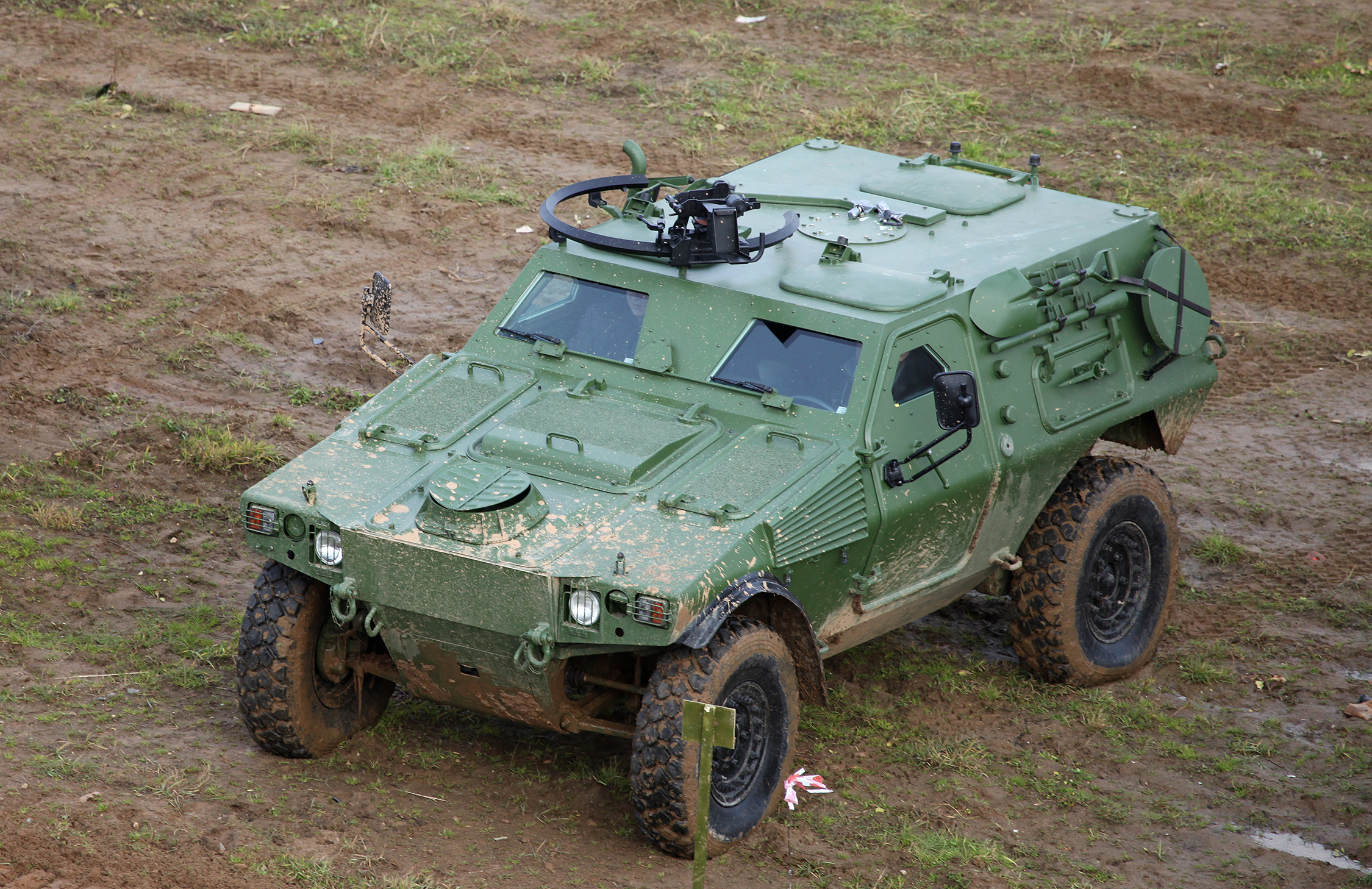 Бронеавтомобиль VBL, который планируется собирать на челнинском предприятии АСТЕЙС (VBL light tactical vehicle)